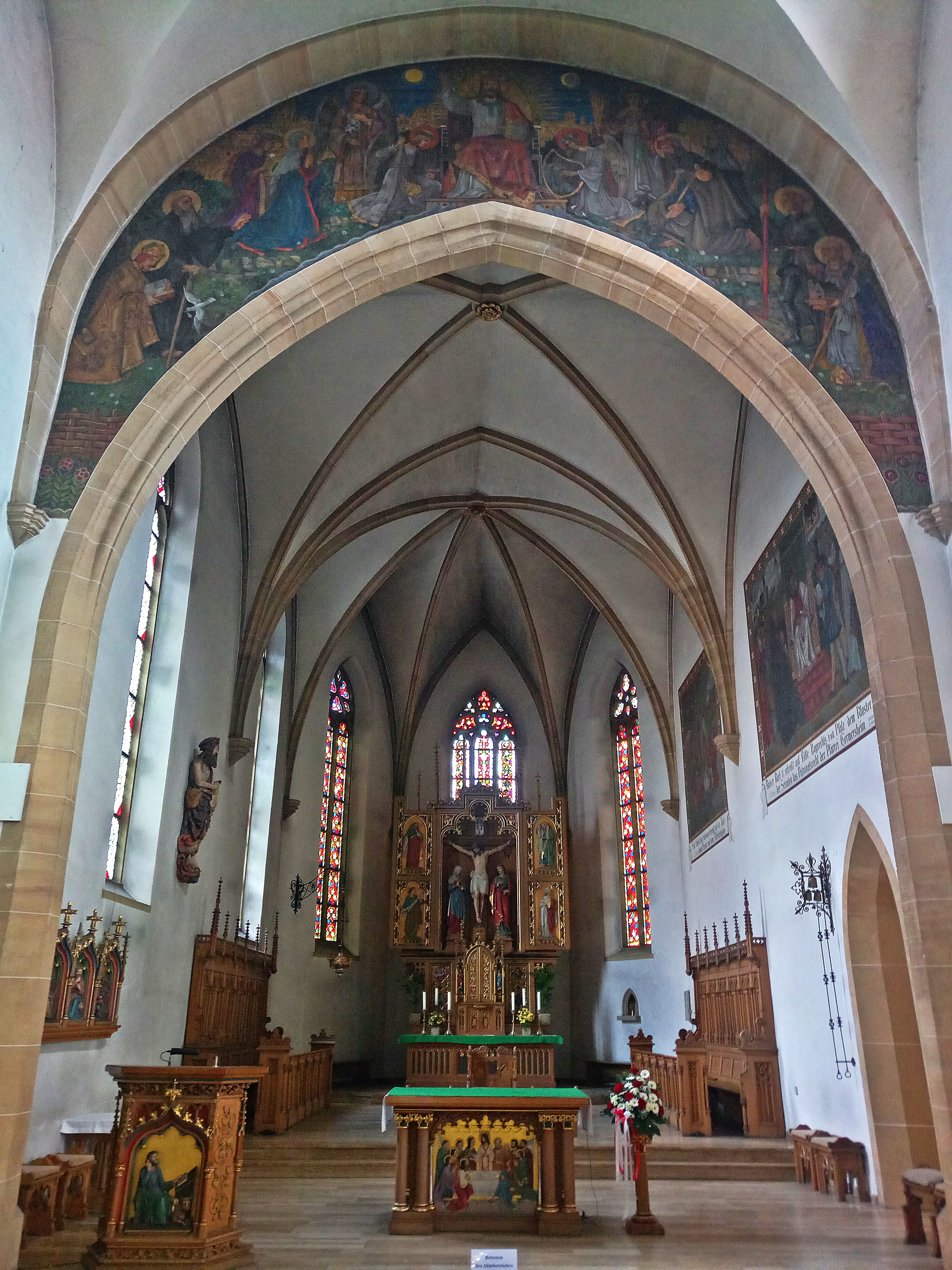 Germersheim St. Jakobus, Chorbereich